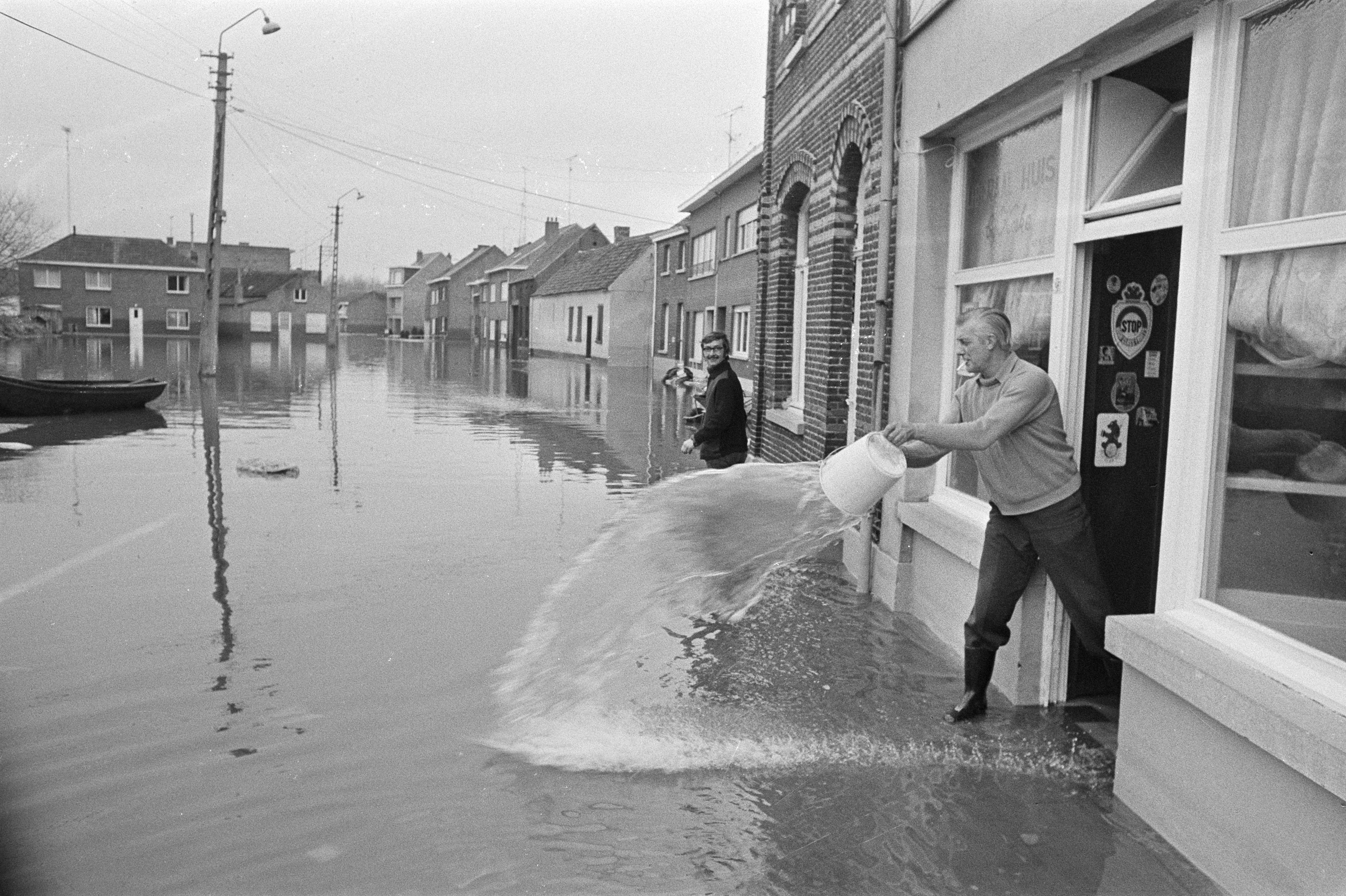 Collectie / Archief : Fotocollectie Anefo Reportage / Serie : [ onbekend ] Beschrijving : Herstel overstromingen in Belgie (Ruisbroek) op gang gekomen; man leegt zijn huis met een emmer Datum : 14 januari 1976 Locatie : België Trefwoorden : OVERSTROMINGEN Persoonsnaam : Ruisbroek Fotograaf : Verhoeff, Bert / Anefo Auteursrechthebbende : Nationaal Archief Materiaalsoort : Negatief (zwart/wit) Nummer archiefinventaris : bekijk toegang 2.24.01.05 Bestanddeelnummer : 928-3599